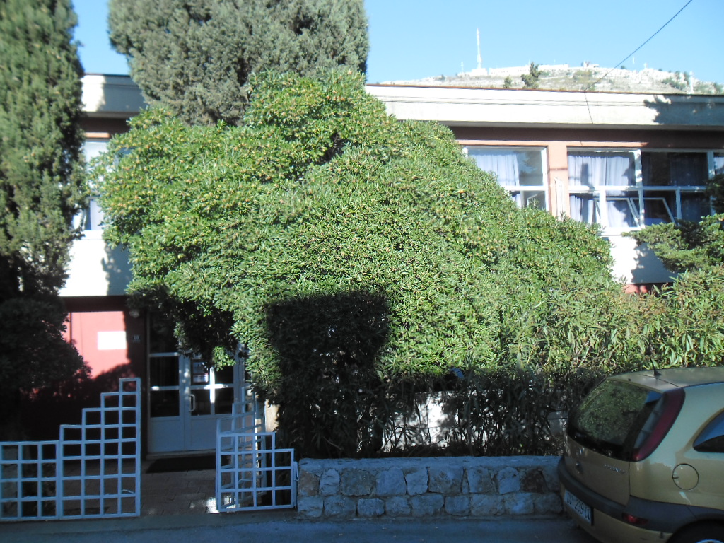 zgrada Medicinske škole Dubrovnik